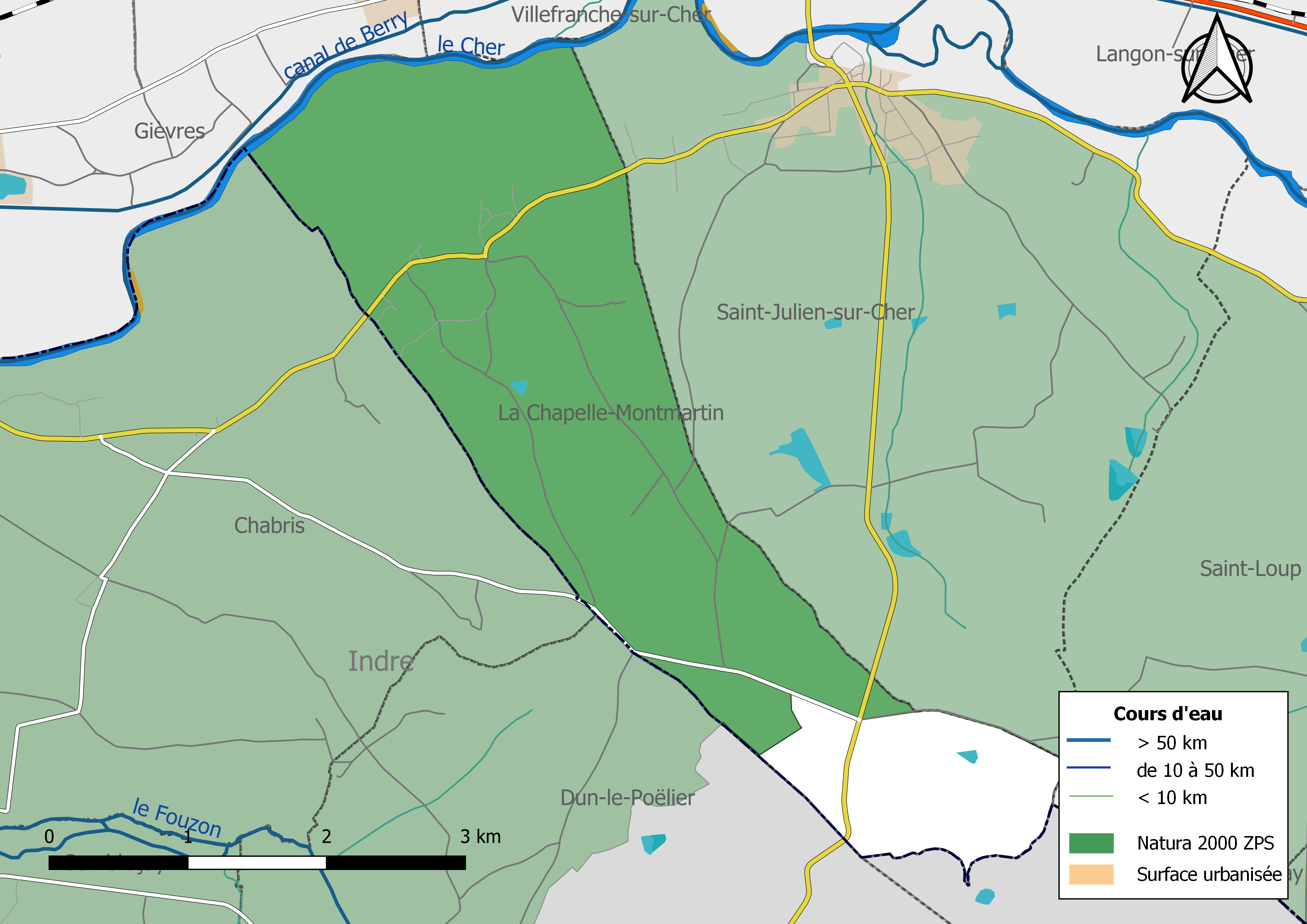 Carte du site Natura 2000 de type ZPS de la commune de La Chapelle-Montmartin (France).